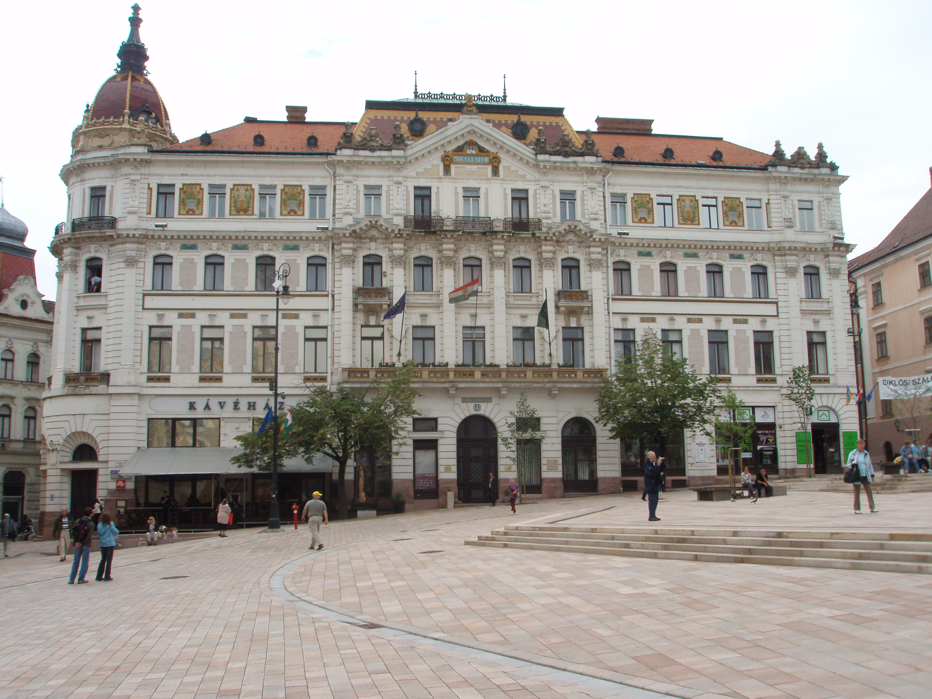 Szechenyi ter